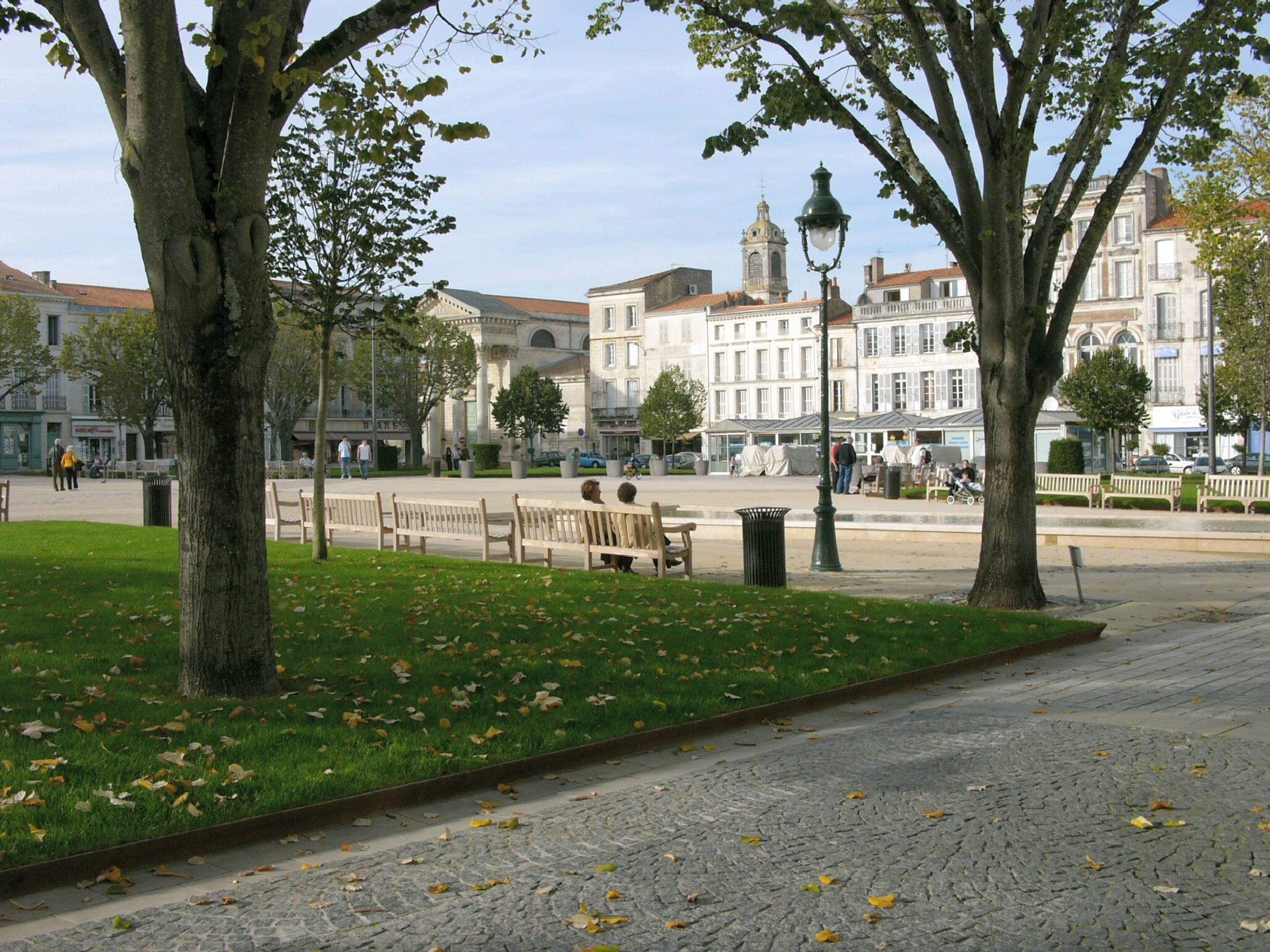 Place Colbert Rochefort Charente Maritime France